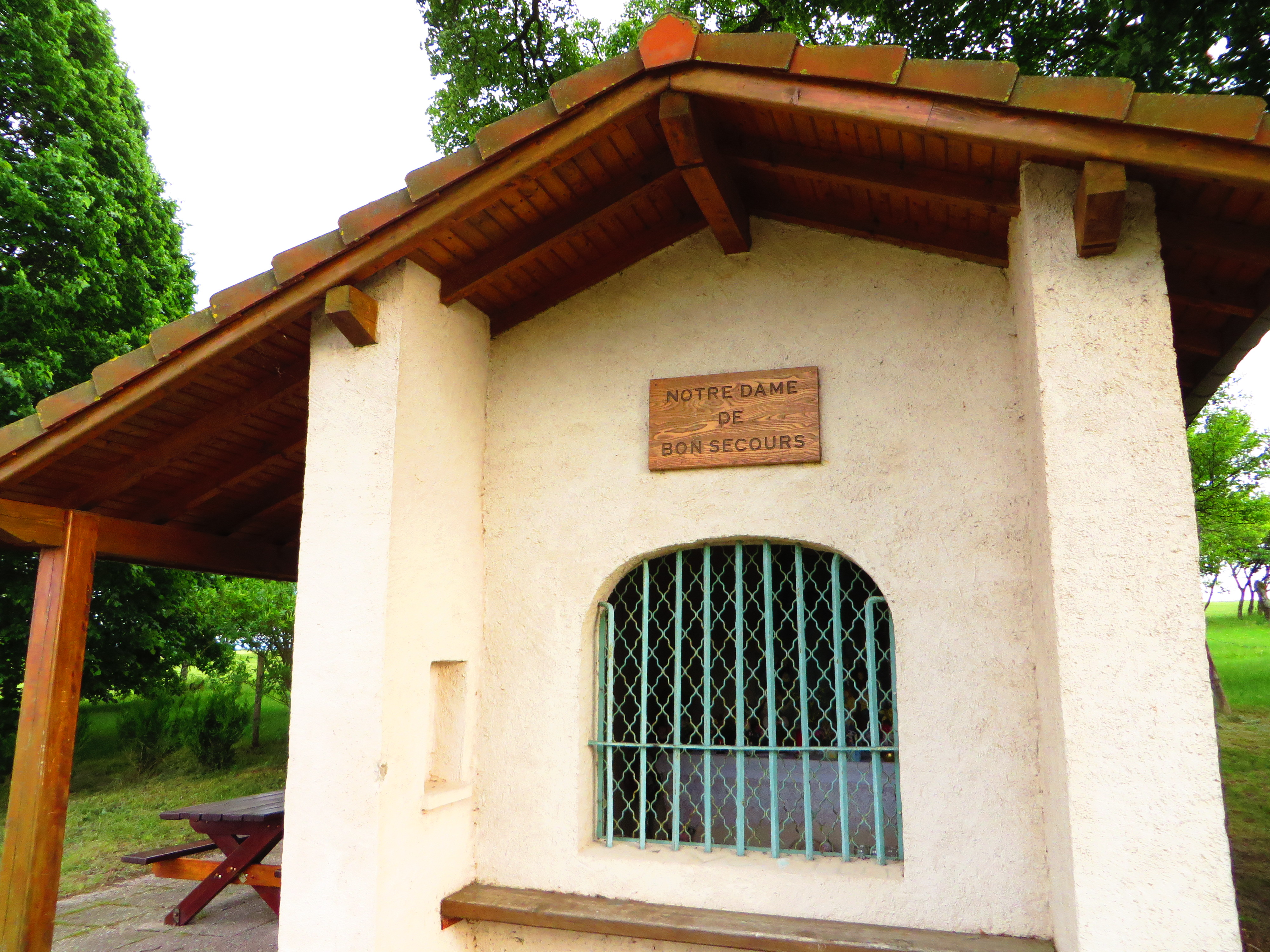 Bettegney-Saint-Brice chapelle Notre-Dame-de-Bon-Secours